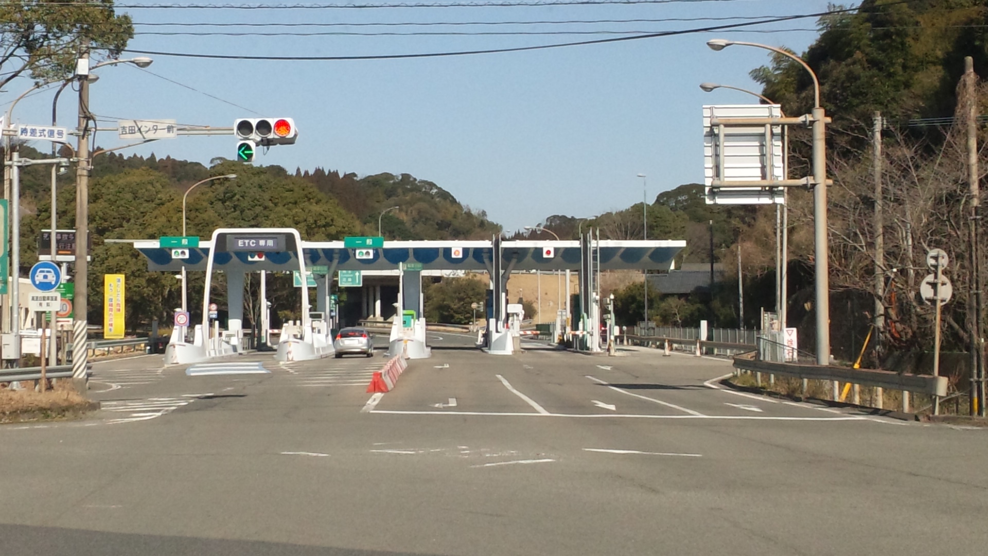 薩摩吉田インターチェンジの画像